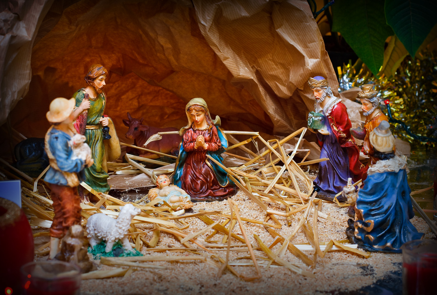 Portal de Belén